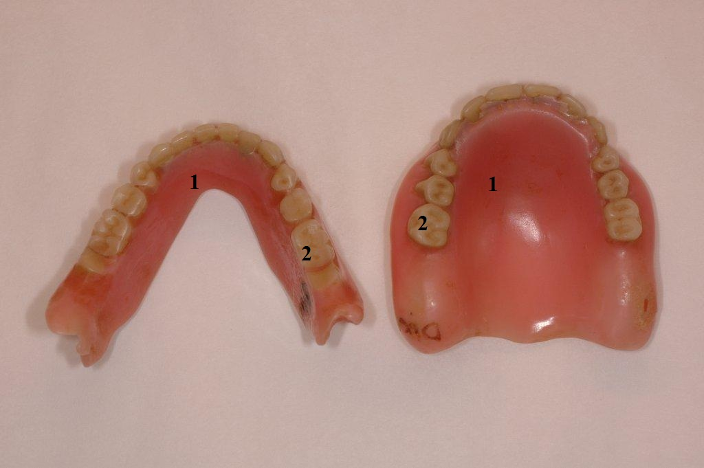 Venstre) Underkjeve helprotese. Høyre) Overkjeve helprotese 1) Protesebasis av akryl 2) Plasttenner